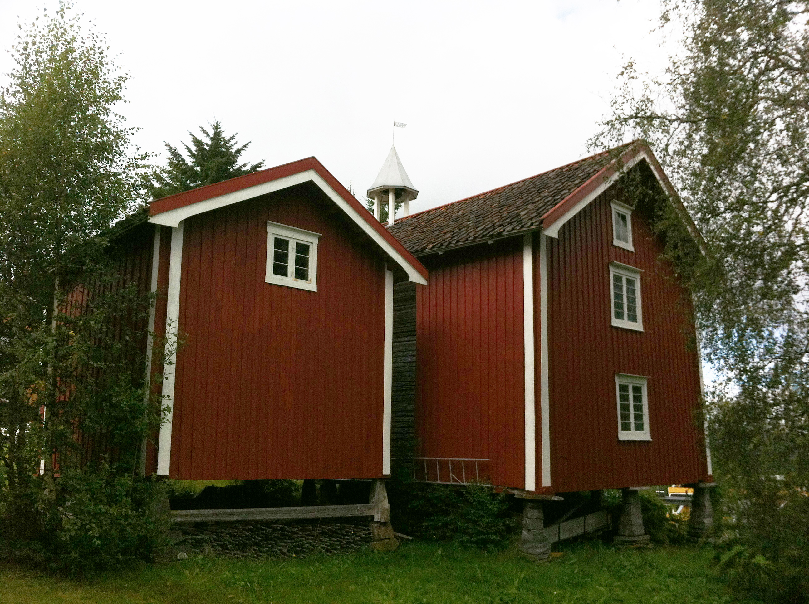 Stabbur, Gjesvold/Gjesvål gård, Orkdal